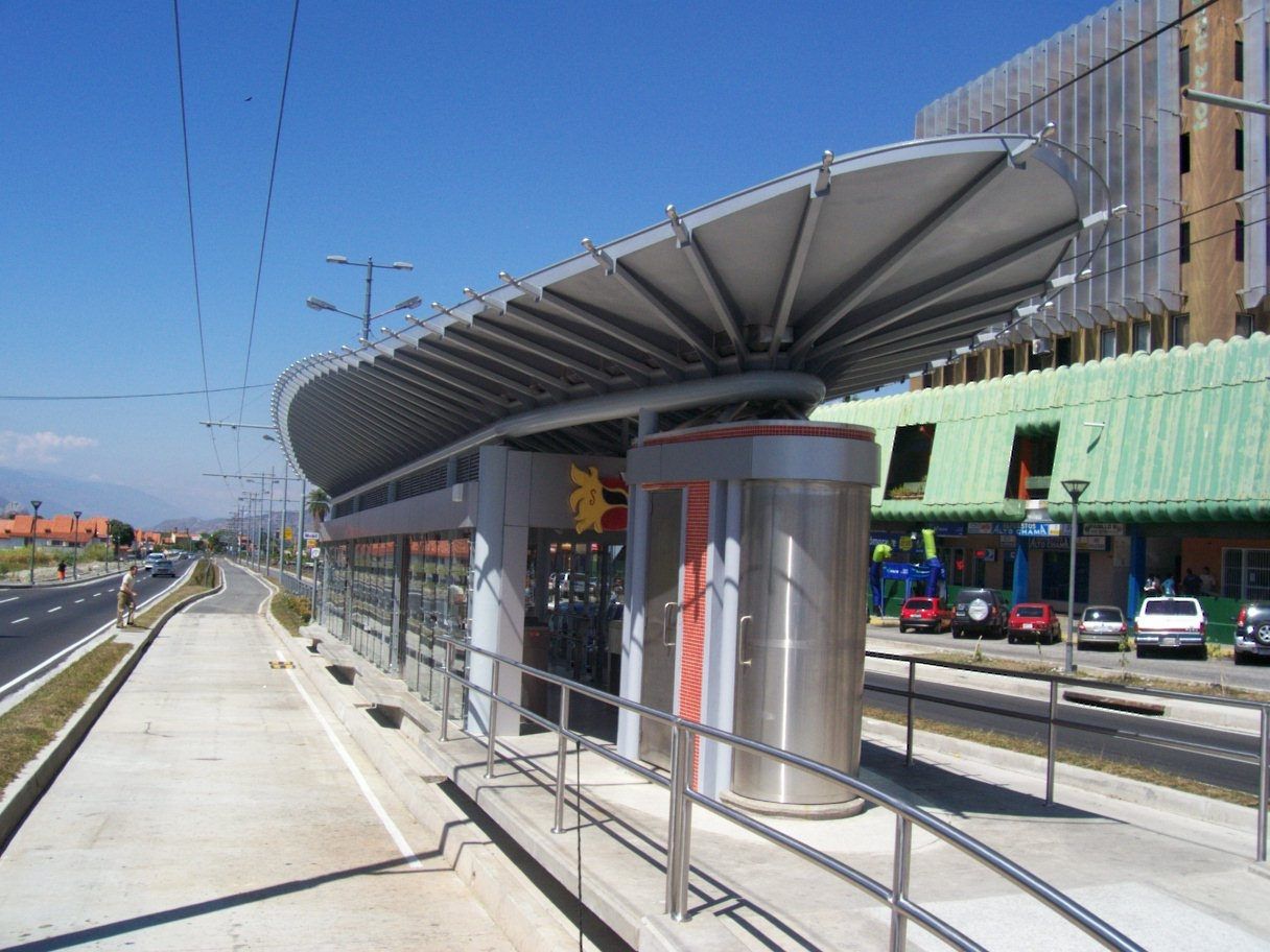 Estación "Alto Chama" de la línea 1 del sistema Trolmerida